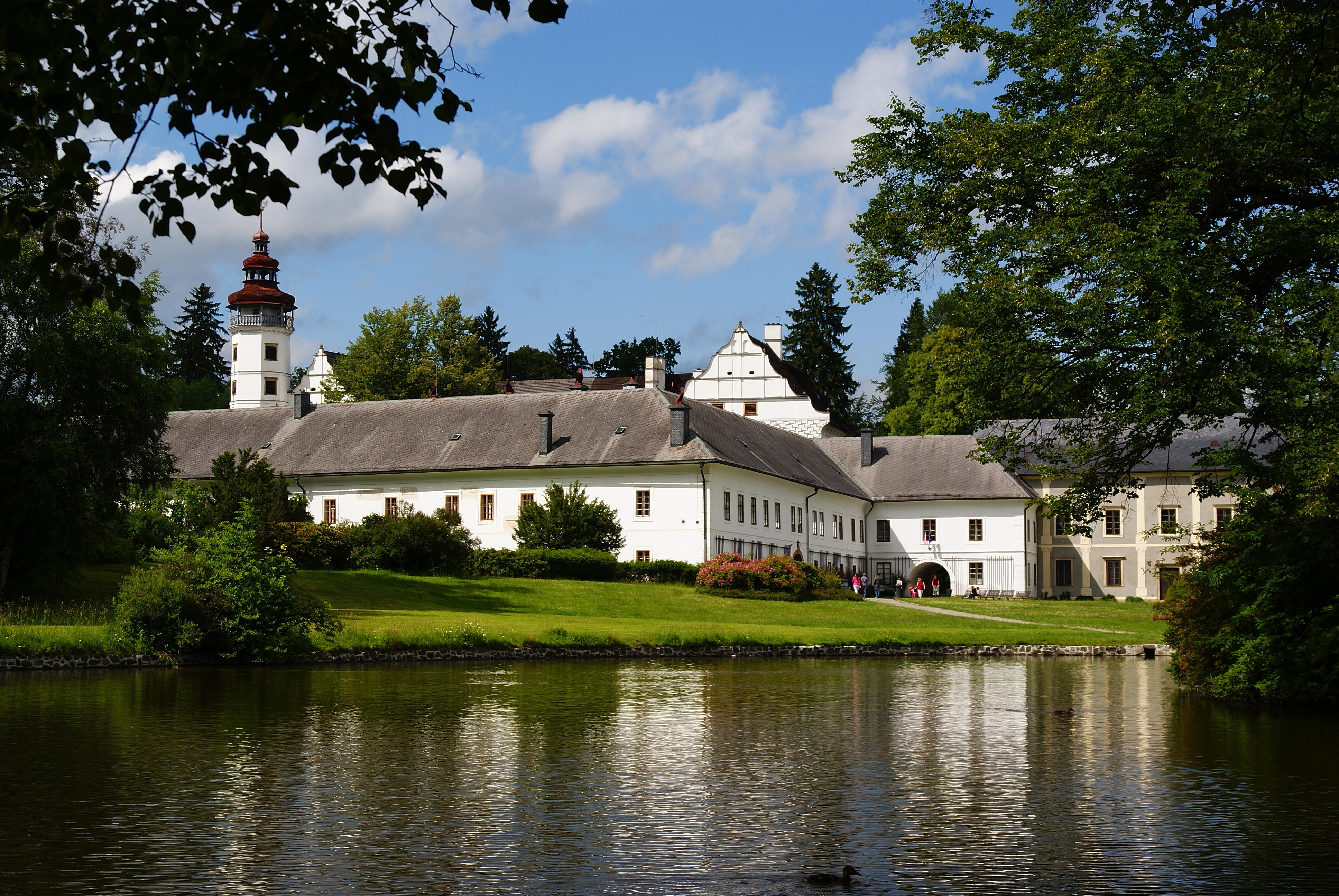 Zámek Velké Losiny, Velké Losiny 268